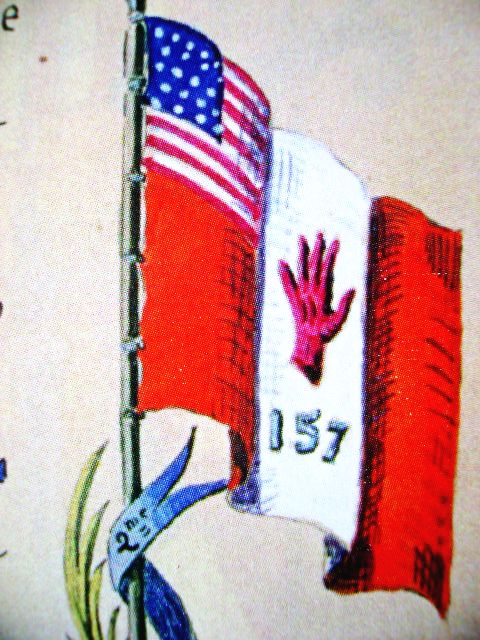 Photographie Par Henri Goybet d'un détail d'une page du livre de famille du Général Mariano Goybet (1898-1931). Oeuvre artistique enluminée de 200 pages numérotées.Page consacrée au commandement de la 157 D.I. par Mariano constituée en partie d'Americains noirs. Citation pour la Distinguished Service Medal Commandement des forces americaines Cabinet du cdt en chef. Mon cher général, le président m'a délégué pour vous conférer la Distinguished Service Medal au nom du gouvernement des États-Unis. Comme commandant de la 157e DI,371 et 372e RI vous avez été l'un des facteurs importants de la victoire des allies par votre brillante conduite et votre haute technicité. Les officiers et les soldats de la 157e 371 et 372 RI considèrent comme un grand honneur d'avoir servi sous vos ordres dans les opérations que vous avez conduites en Champagne et dans les Vosges. Signé General Pershing